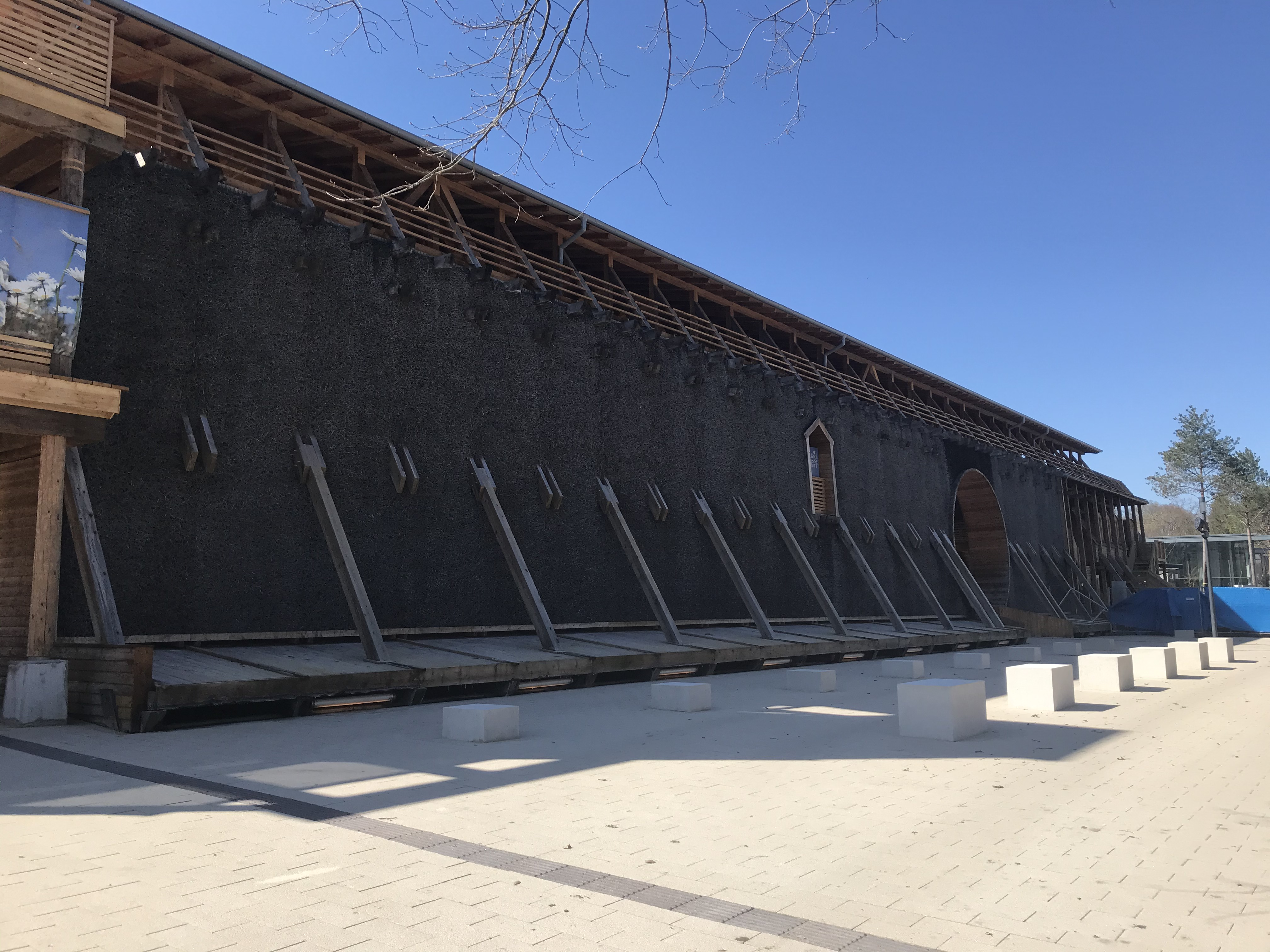 Dies ist der Neubau der Gradierwerkes in Bad Sassendorf